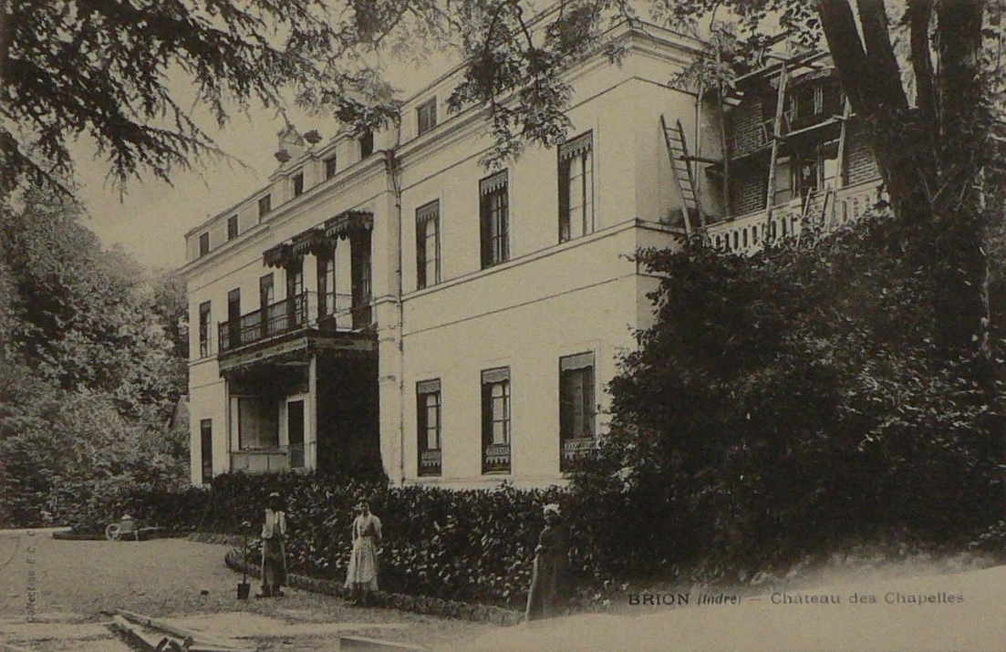 Château des Chapelles à Brion